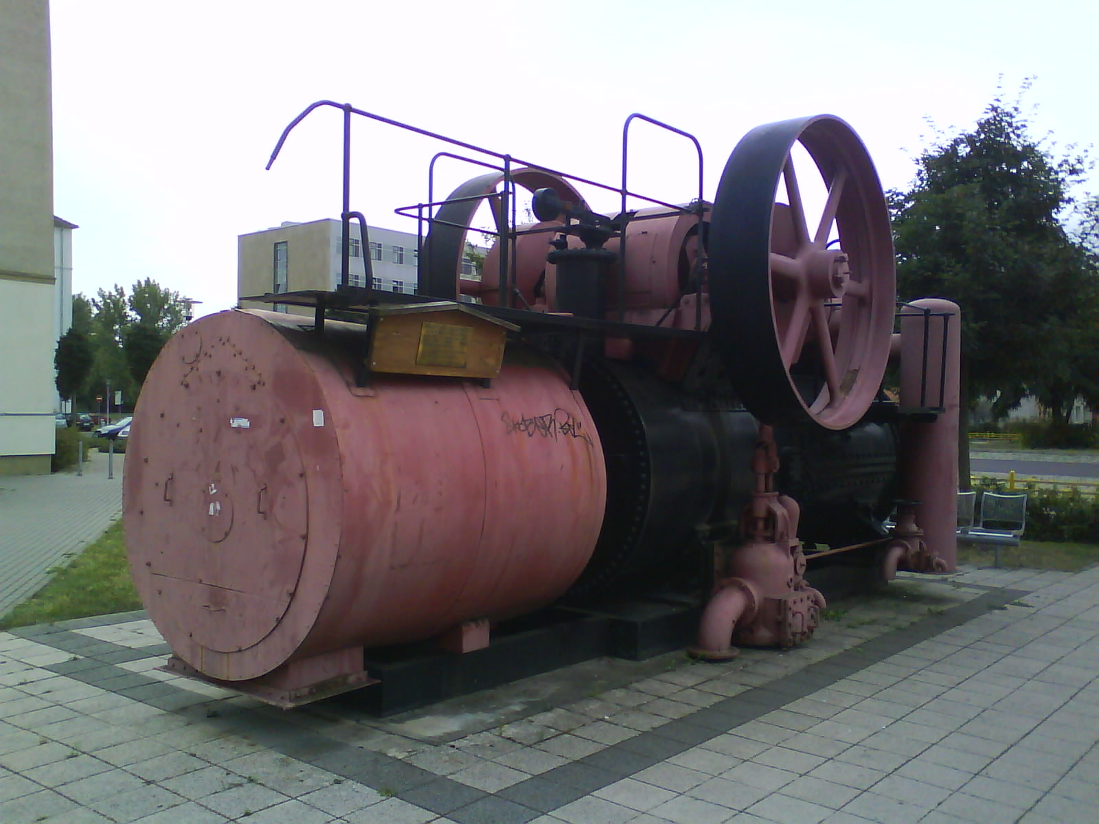 lokomobile der firma wolf aus dem jahr 1923. auf dem campus der otto-von-guericke-universität magdeburg